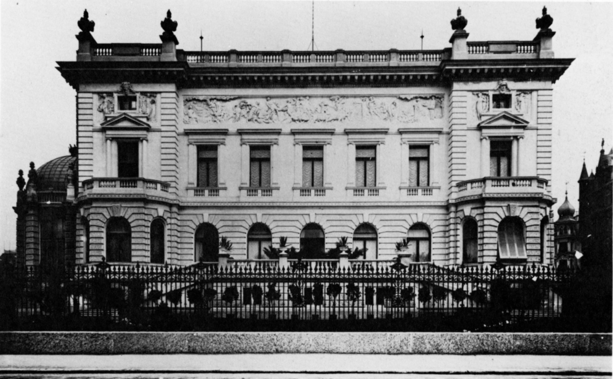 Das Palais Henneberg in Zürich am General-Guisan-Quai (damals Alpenquai), 1898. 1896-1898 im Auftrag des Seidenfabrikanten Gustav Henneberg durch Architekt Johann Emil Schmid-Kerez (1843-1915) erbaut. 1969 abgebrochen zugunsten des Neubaus des IBM-Gebäudes durch Jacques Schader.